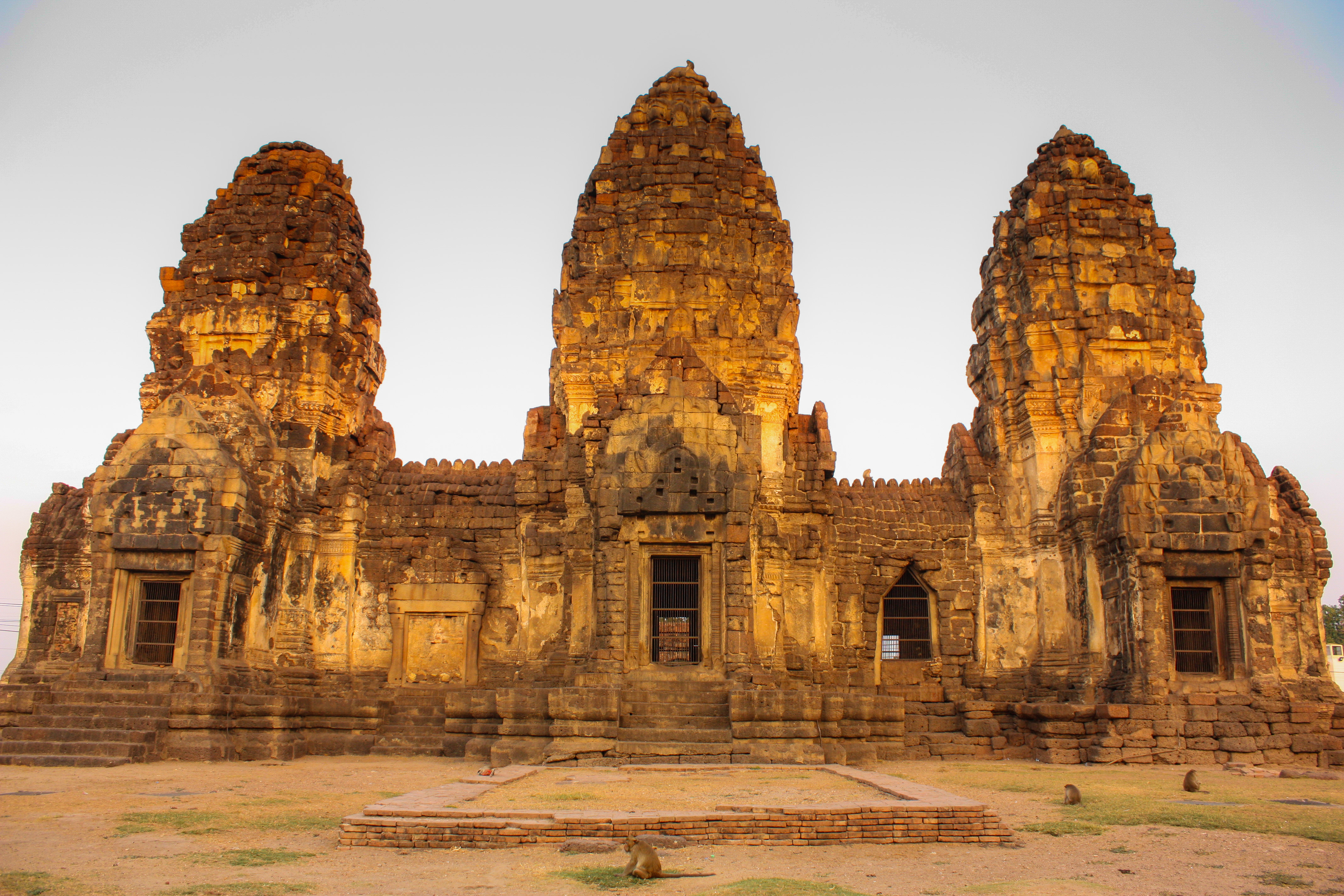 ปรางค์สามยอด][ลพบุรี